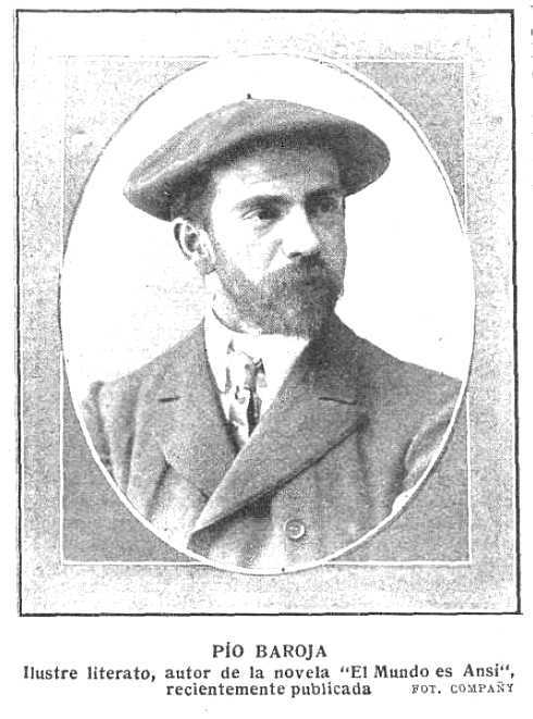 Pio Baroja, ilustre literato autor de la novela "El Mundo es Ansi" recientemente publicada